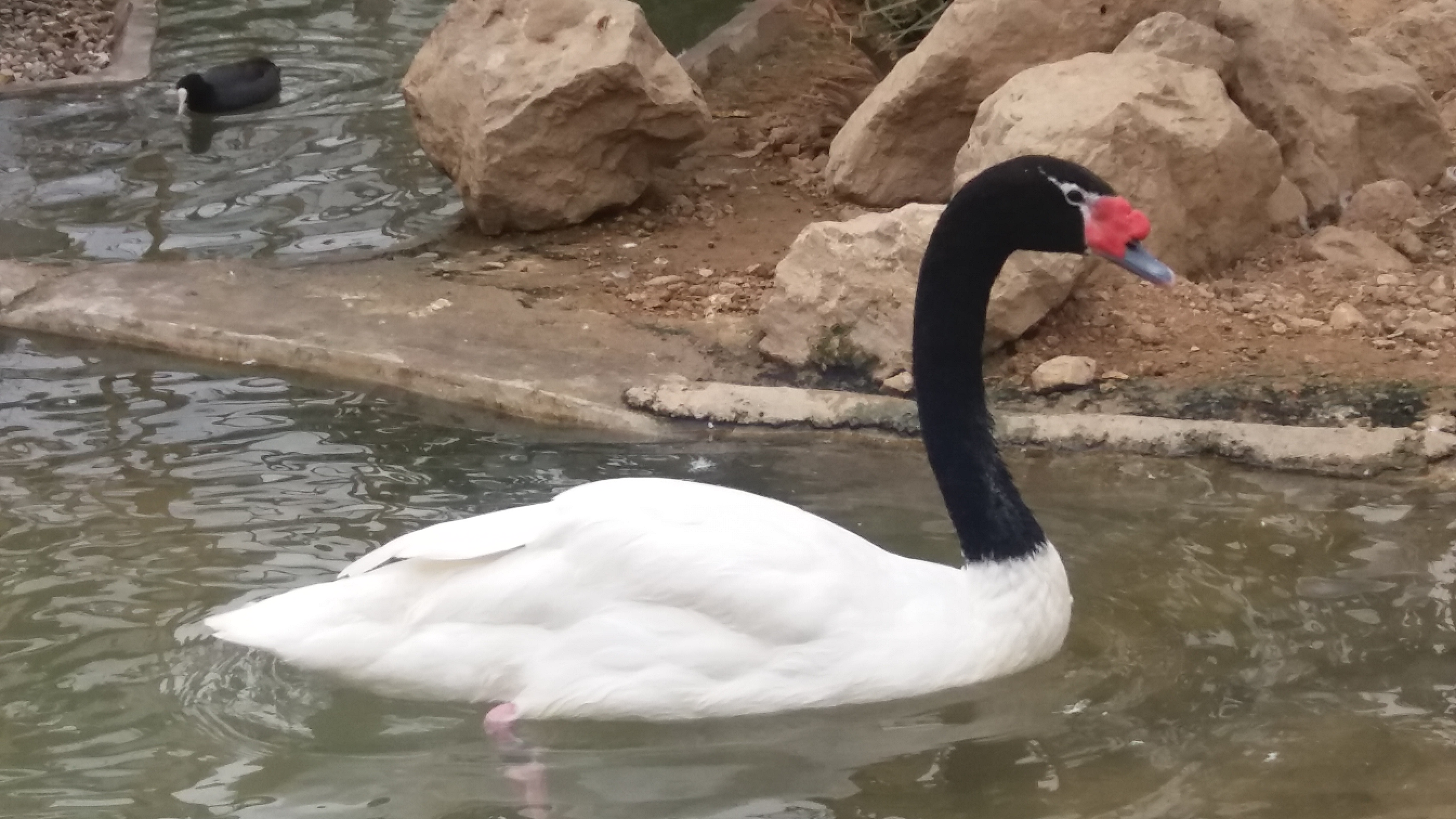 قوی گردن سیاه، باغ پرندگان تهران